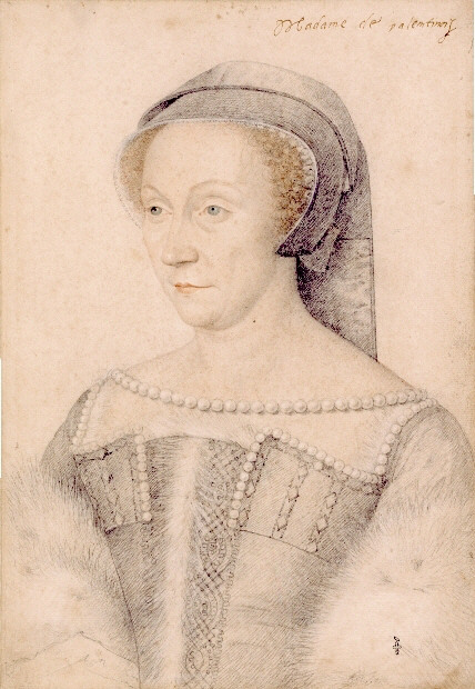 Diane de Poitiers duchesse de Valentinois (1499-1566), Chantilly, musée Condé, inv. MN 204